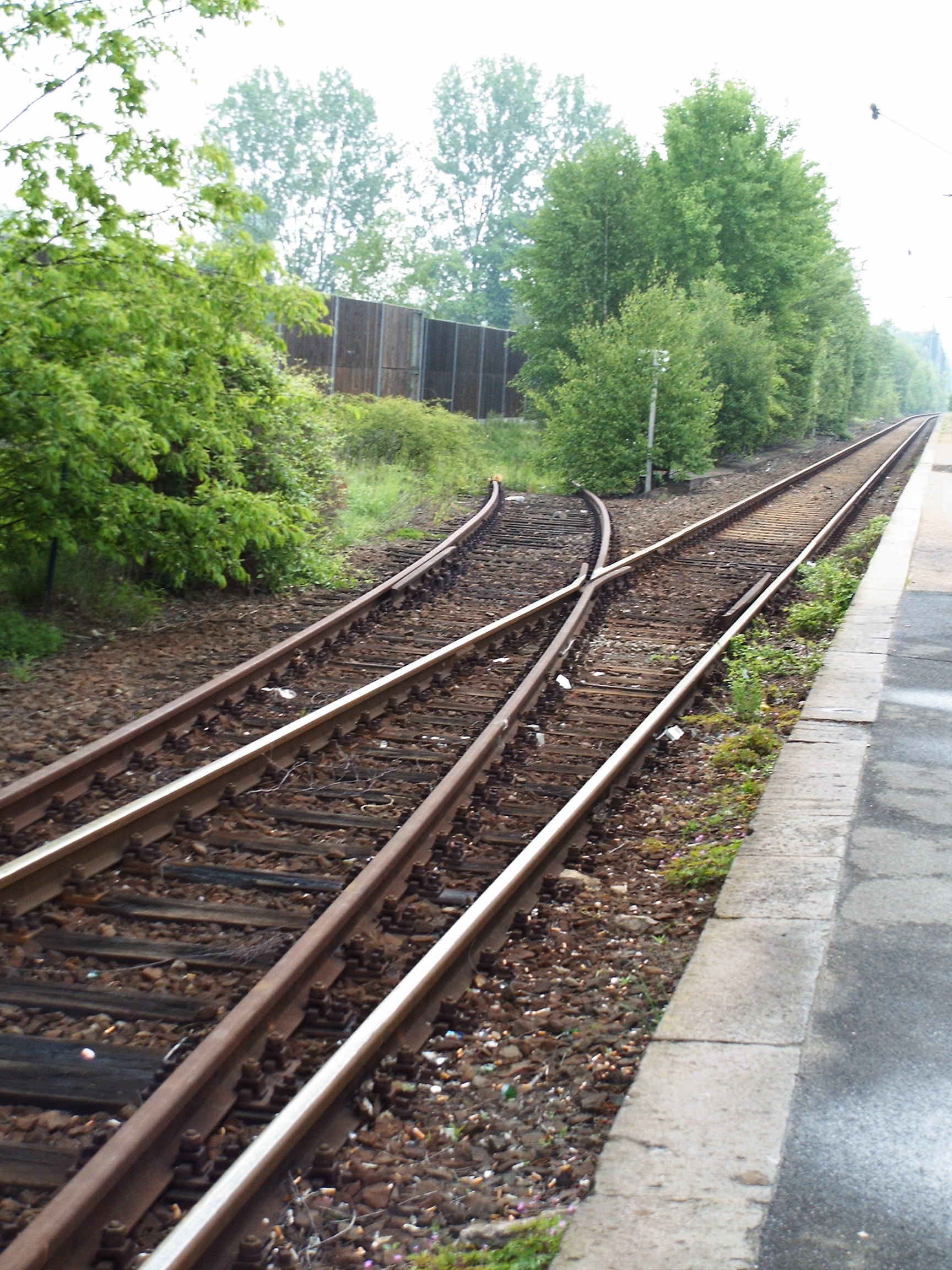 Eingestellte Weiche, die zu dem Kling Furnierwerk führte, an Gleis 3 am Bahnhof Maintal Ost.